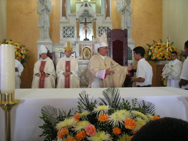 Ceremonia de instauracion de la nueva Diocesis de El Banco y nombramiento de su primer obispo: Jaime Duque Correa, de manos del Nuncio apostolico